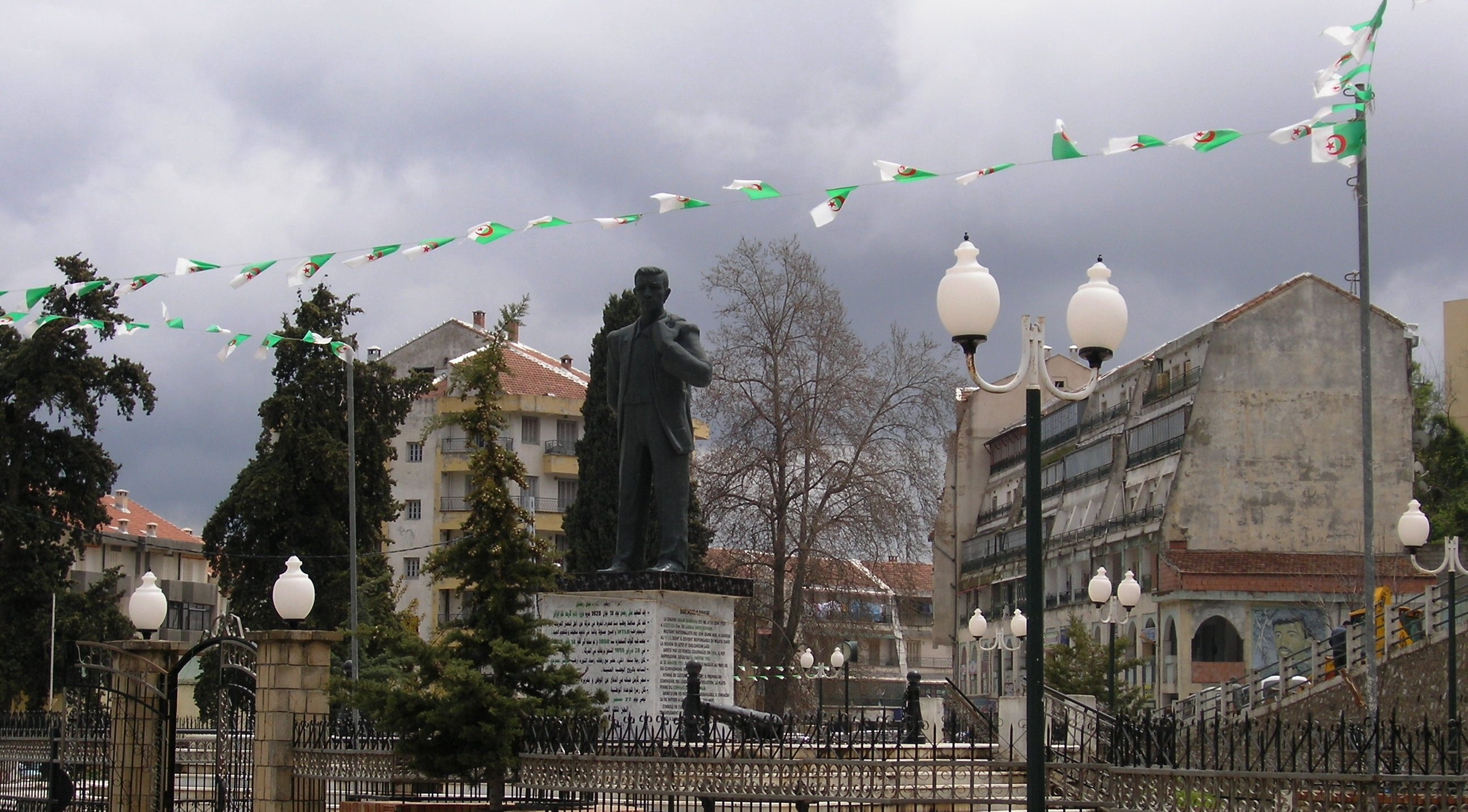 Place Abane Ramdane à Larbaa n At-Yiraten